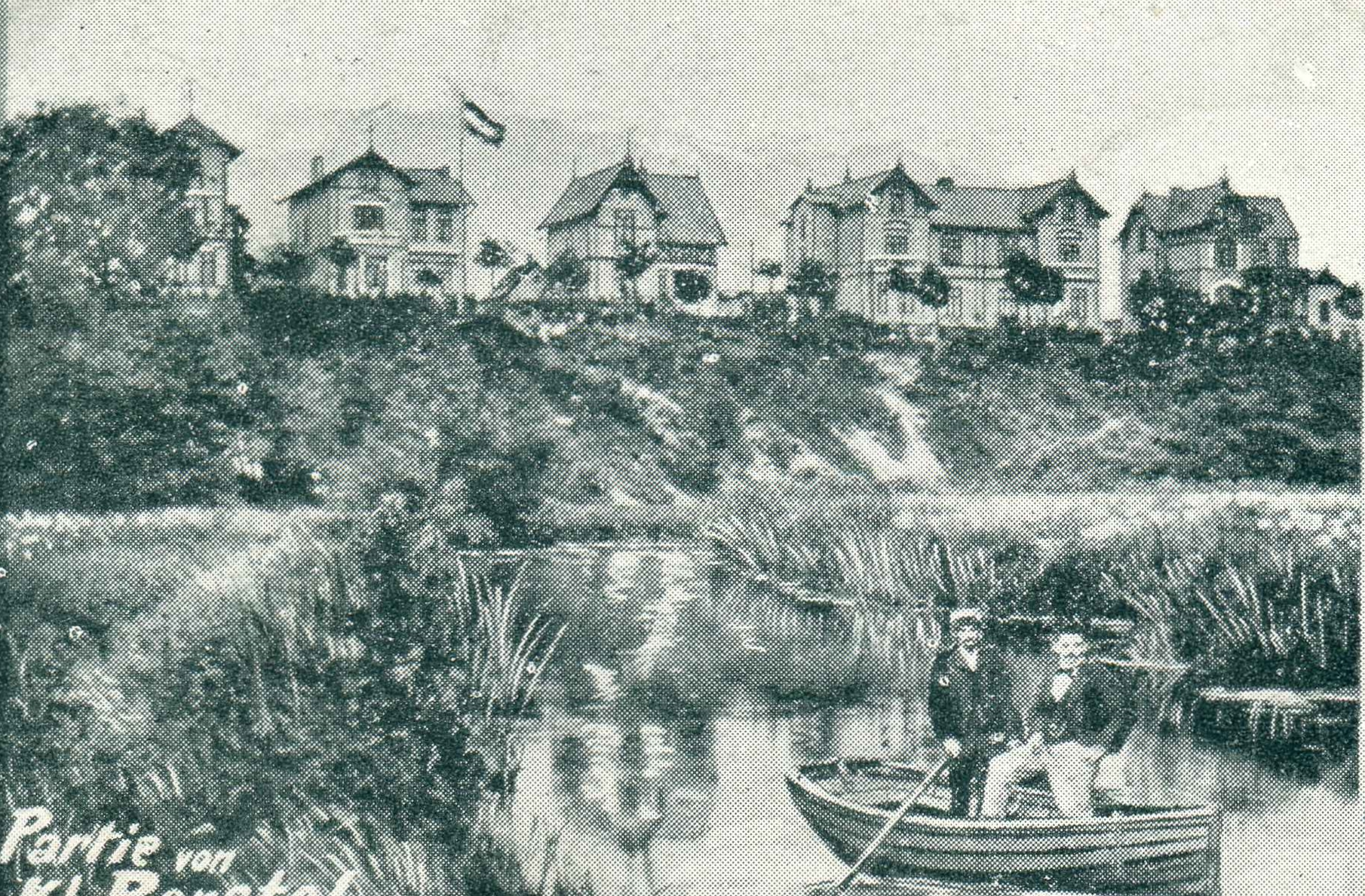 Kahnpartie auf der Oberalster in Hamburg- Klein Borstel vor Villen auf einer Postkarte von 1899